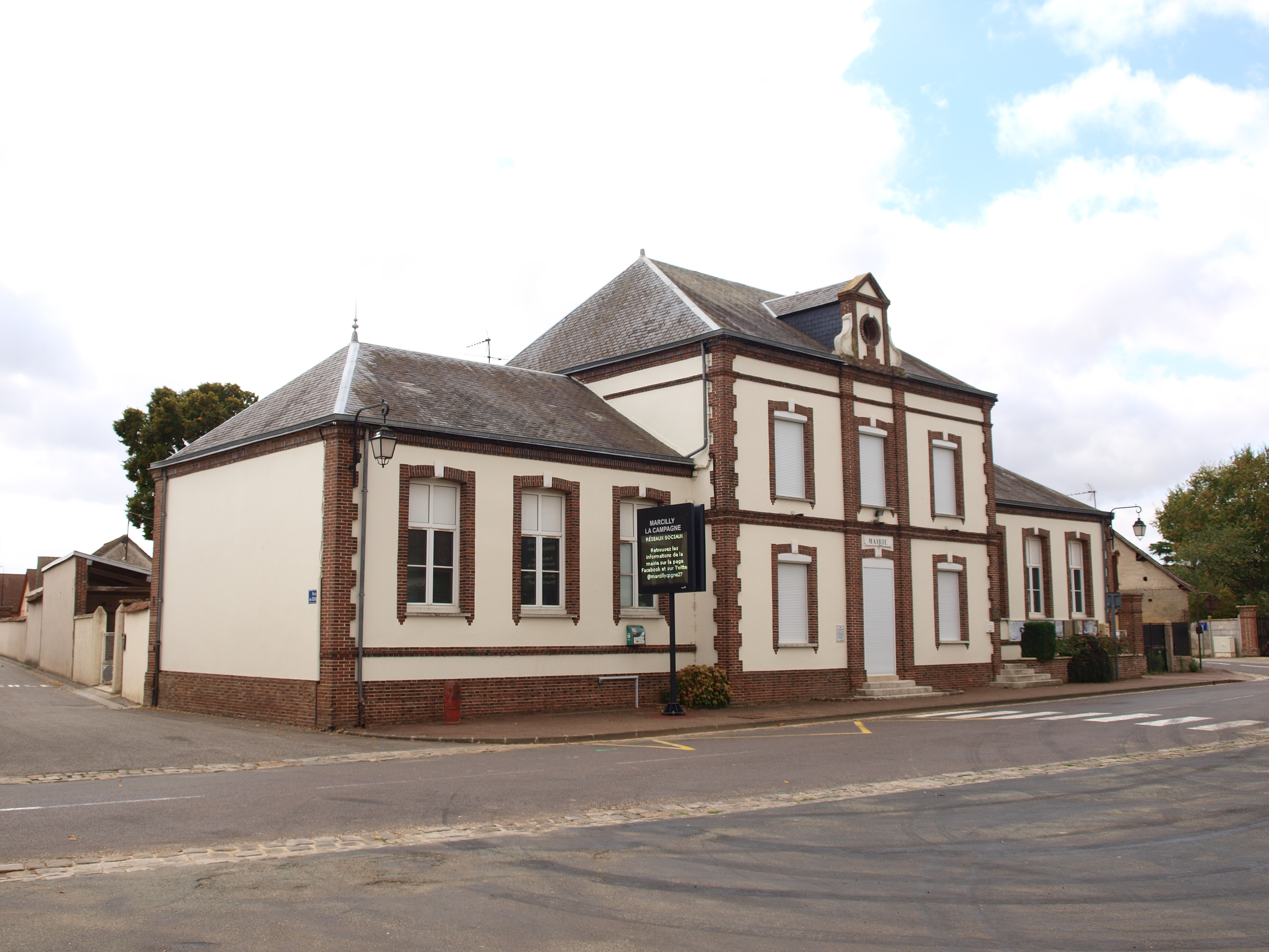 Marcilly-la-Campagne (Eure, France)